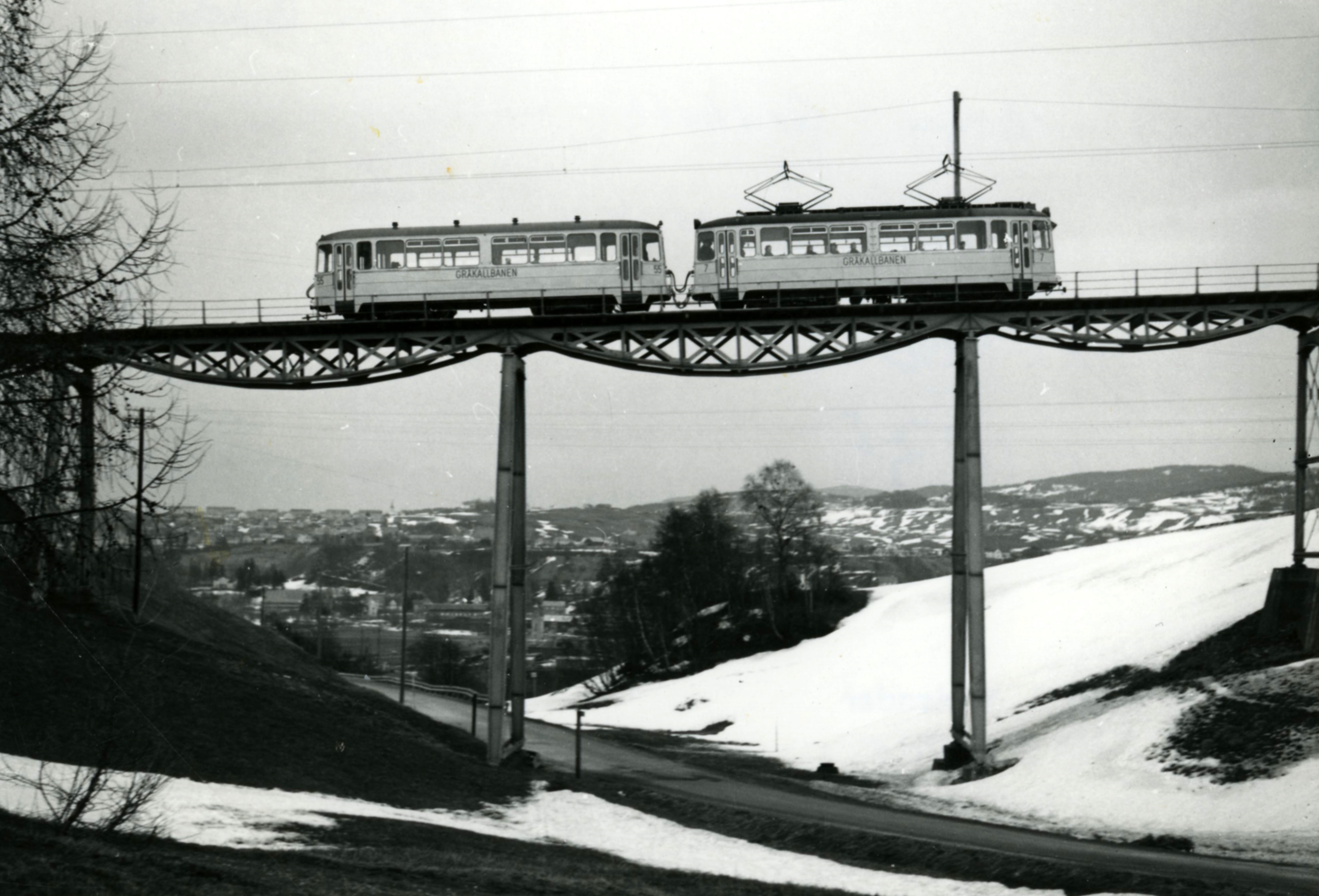 Format: Fotopositiv. Gråkallbanen på Hoemsbrua den 26. april 1958. Foto: L. Welander